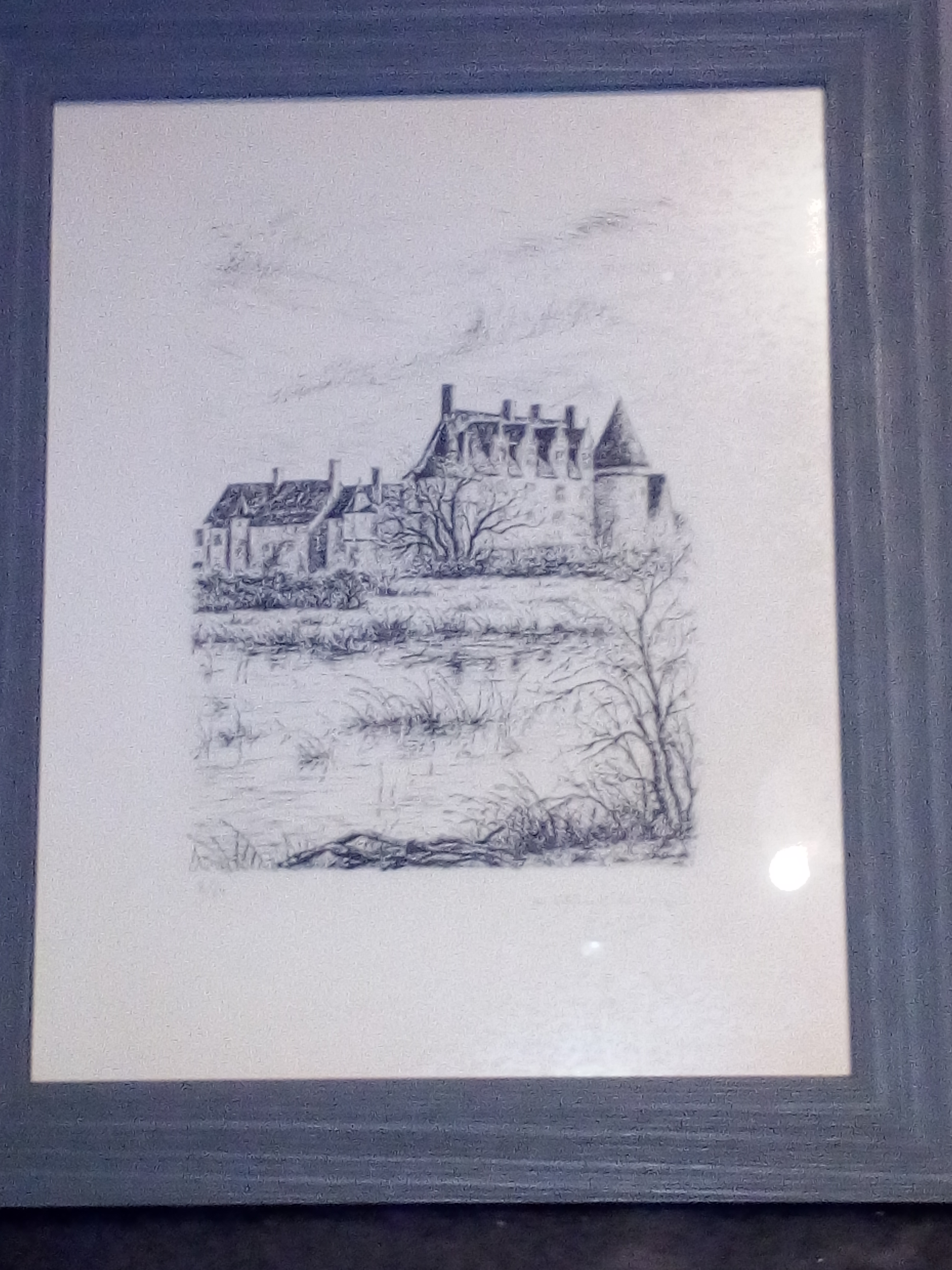 Gravure d'Aymar de Lézardière (1917-1995) représentant le château de la Motte-Glain, nommé ici "Paysage de Normandie." Gravure numéroté 8 sur 60